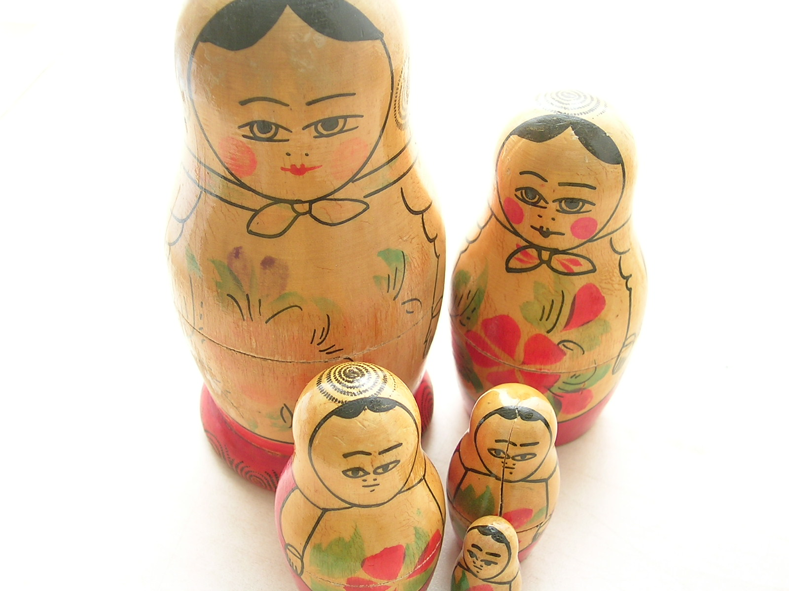 Nina Rusa